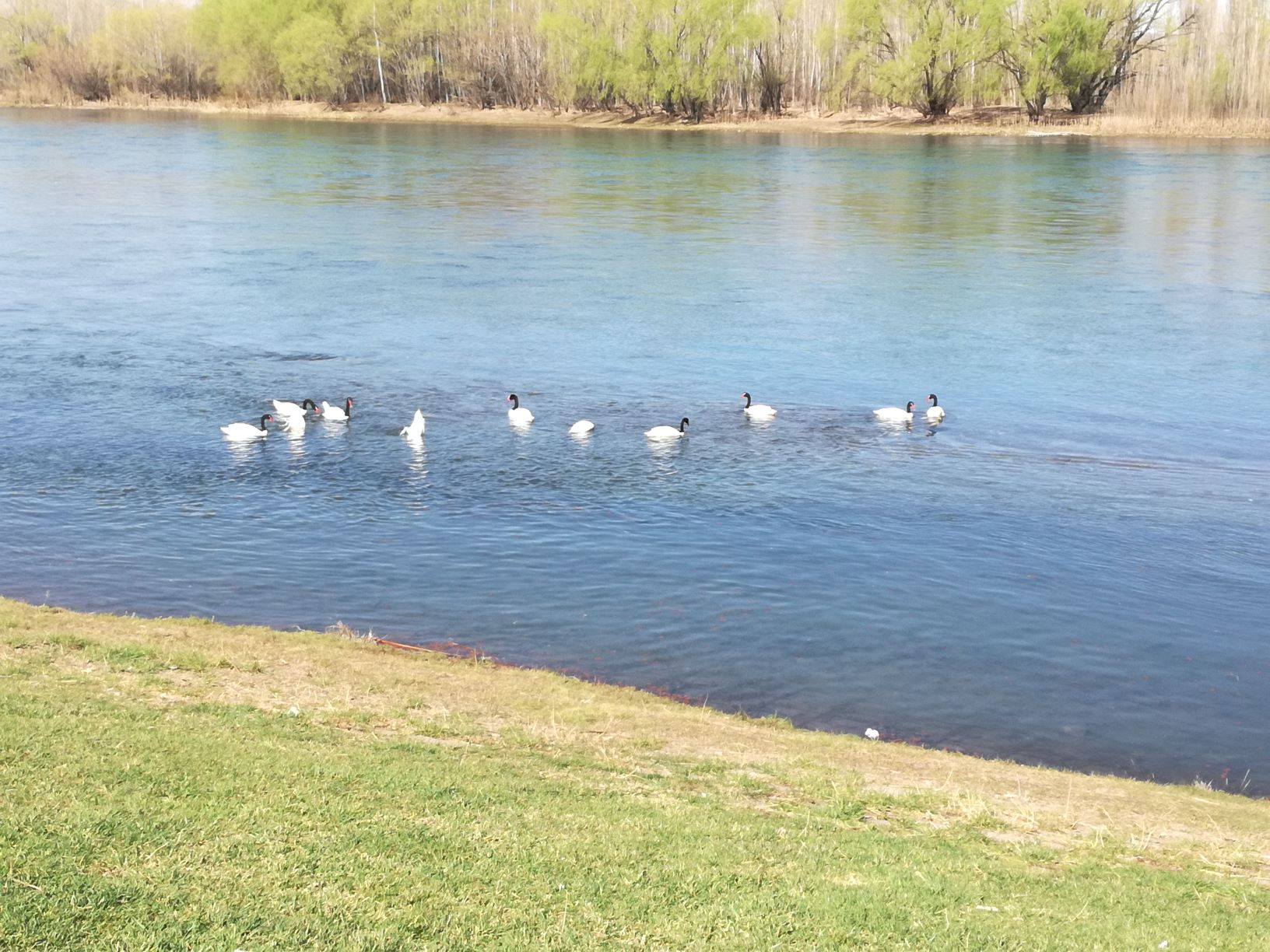 Animales acuáticos del rio Limay